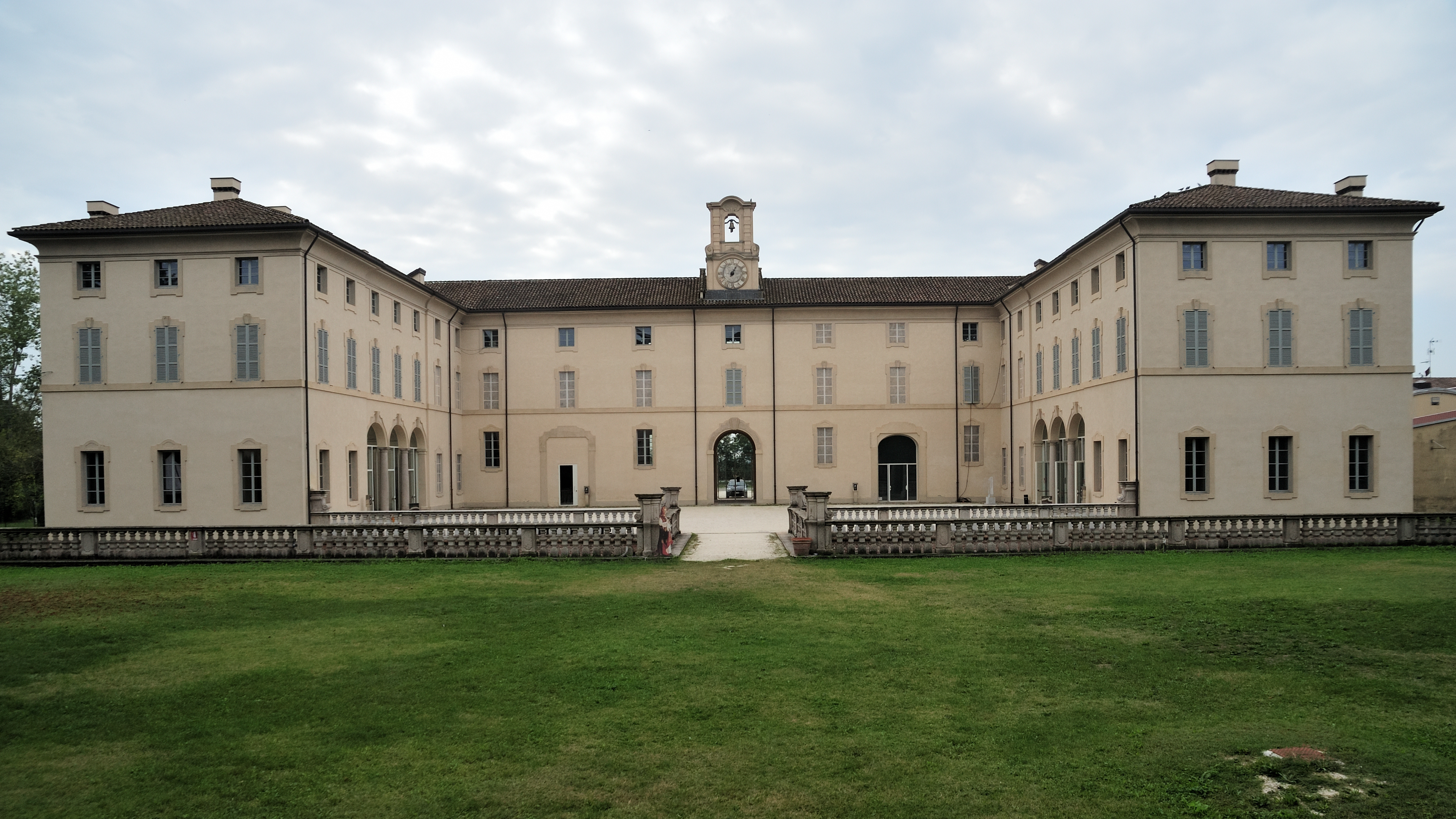 villa Pallavicino This is a photo of a monument which is part of cultural heritage of Italy.